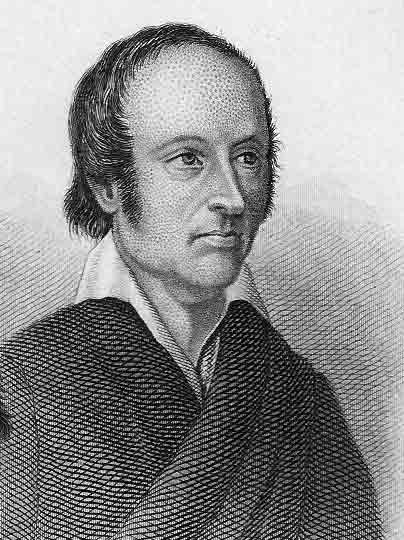 Anders Lindeberg (1789-1849)